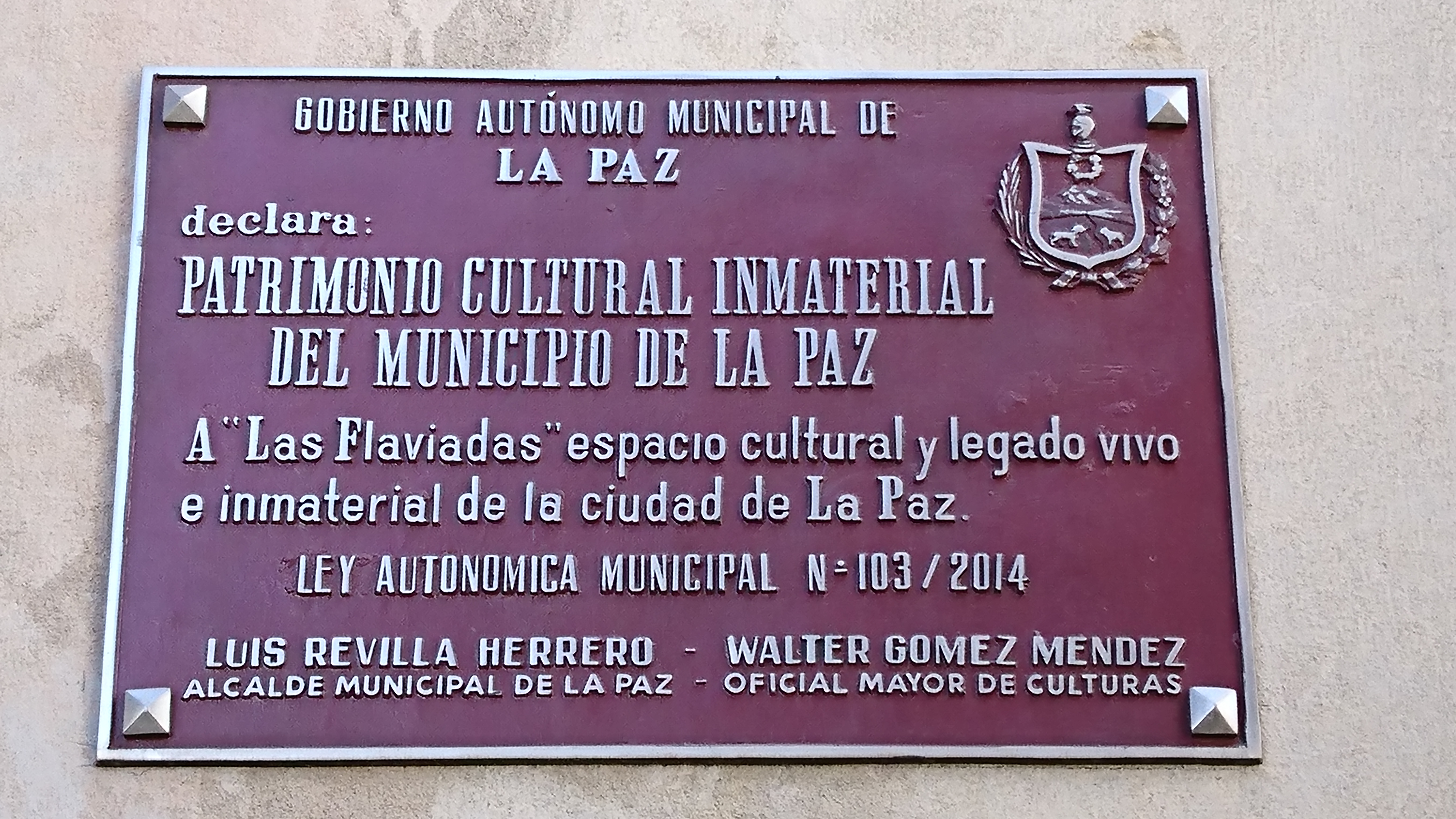 Placa de reconocimiento Las Flaviadas La Paz